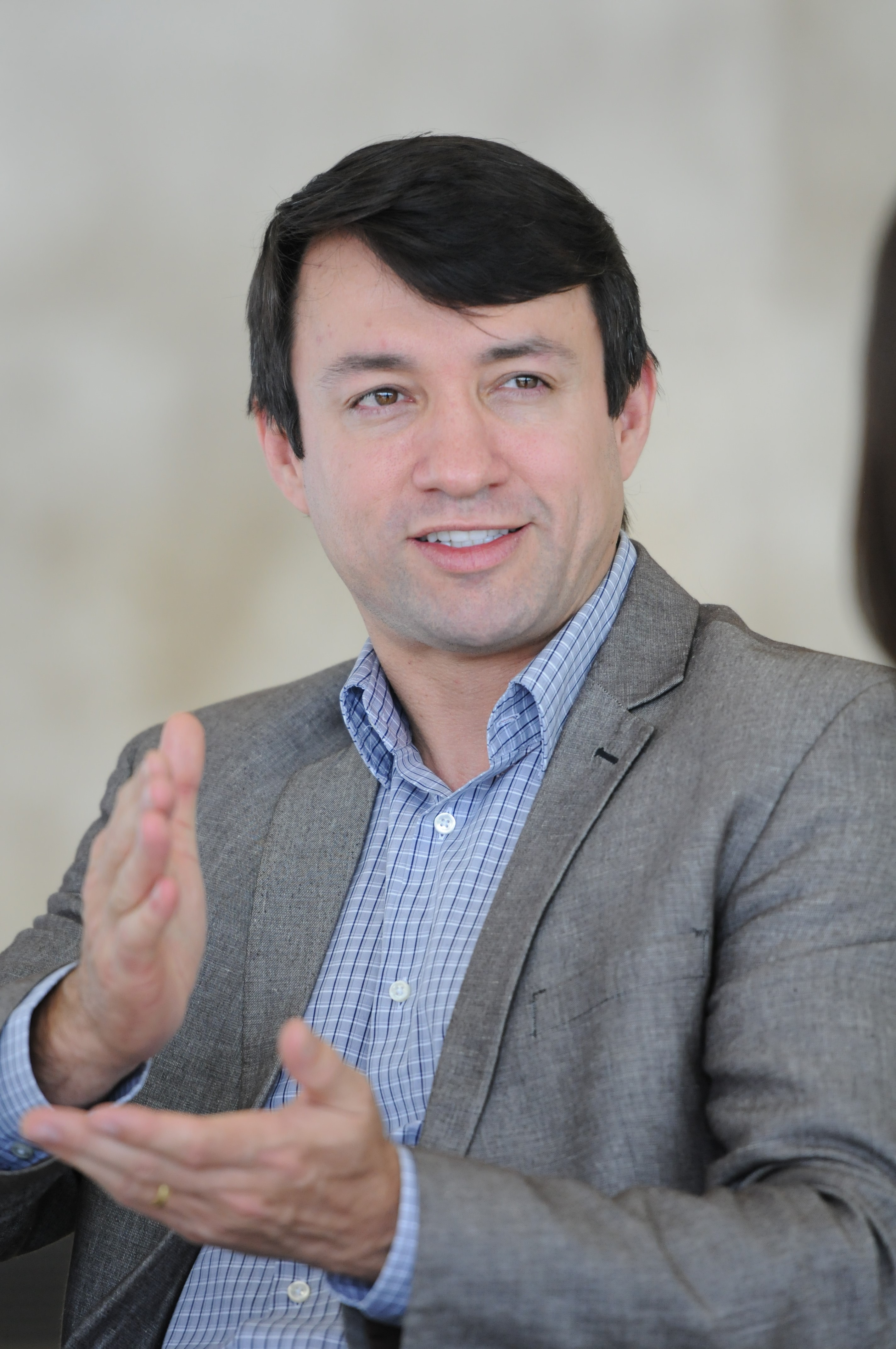 Imagem de perfil do atual Secretário Chefe de Estado da Casa Civil do Distrito Federal